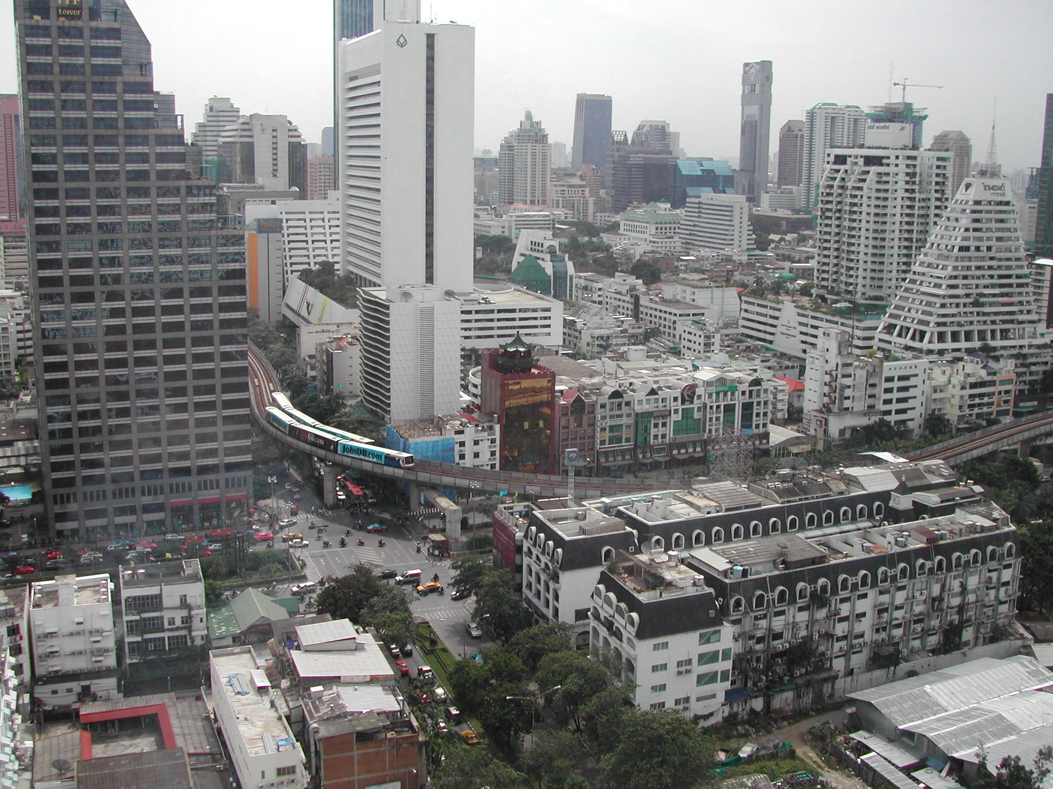 Panorámica de Bangkok